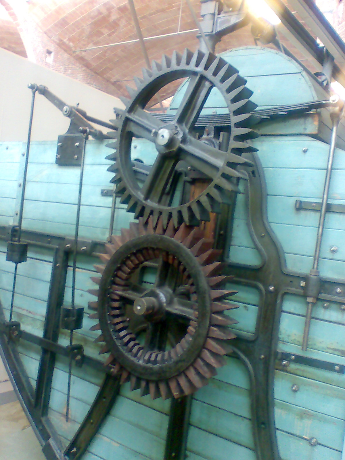 Engranajes artesanales de máquina textil. Museo de la Técnica de Terrassa